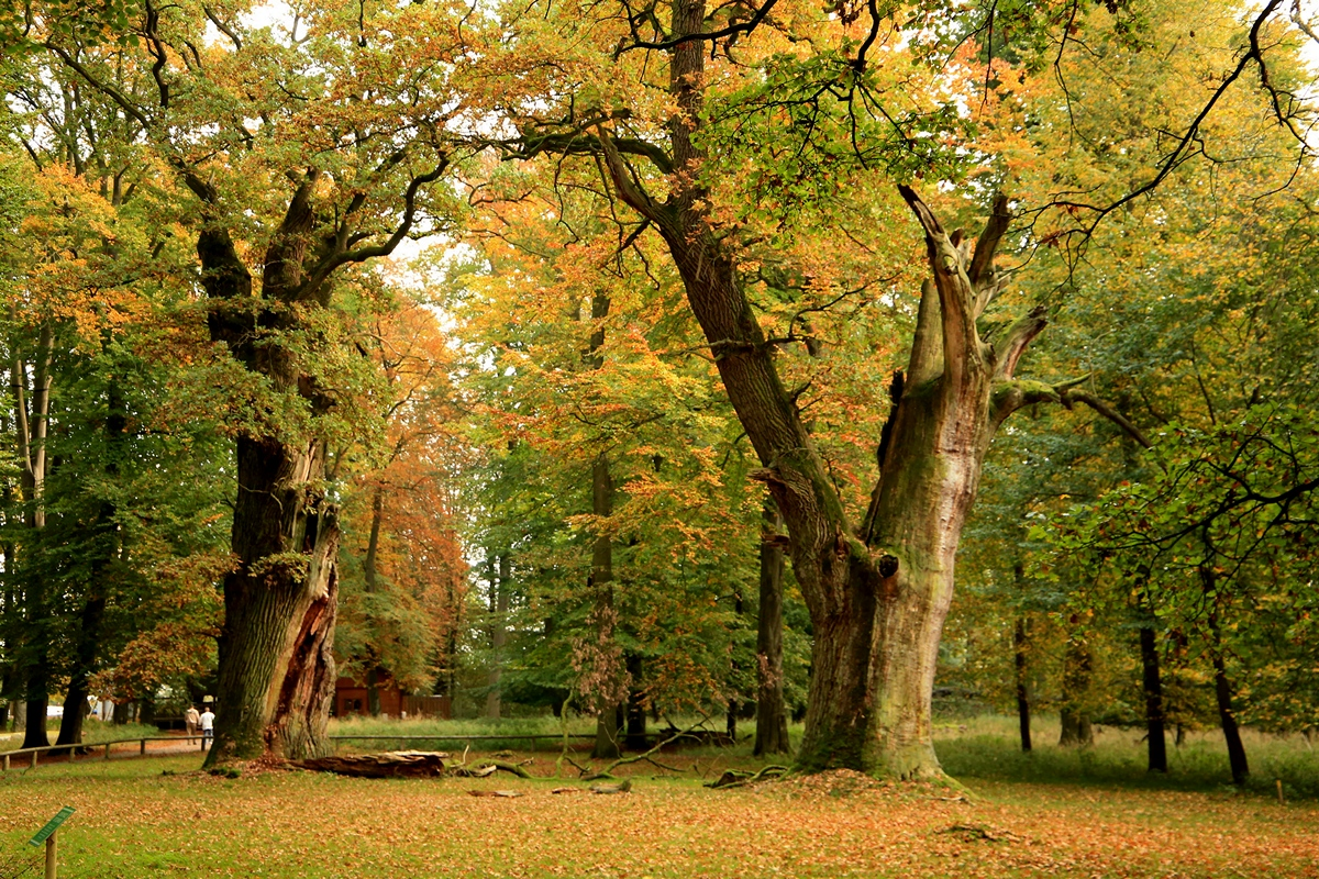 Herbstliche Ivenacker Eichen 1 und 2. Mit dieser Nummerierung stehen die beiden abgebildeten Bäume im Katalog des Forstamtes und im Buch Ivenacker Eichen – Tausendjährige Eichen im Wandel der Zeit.